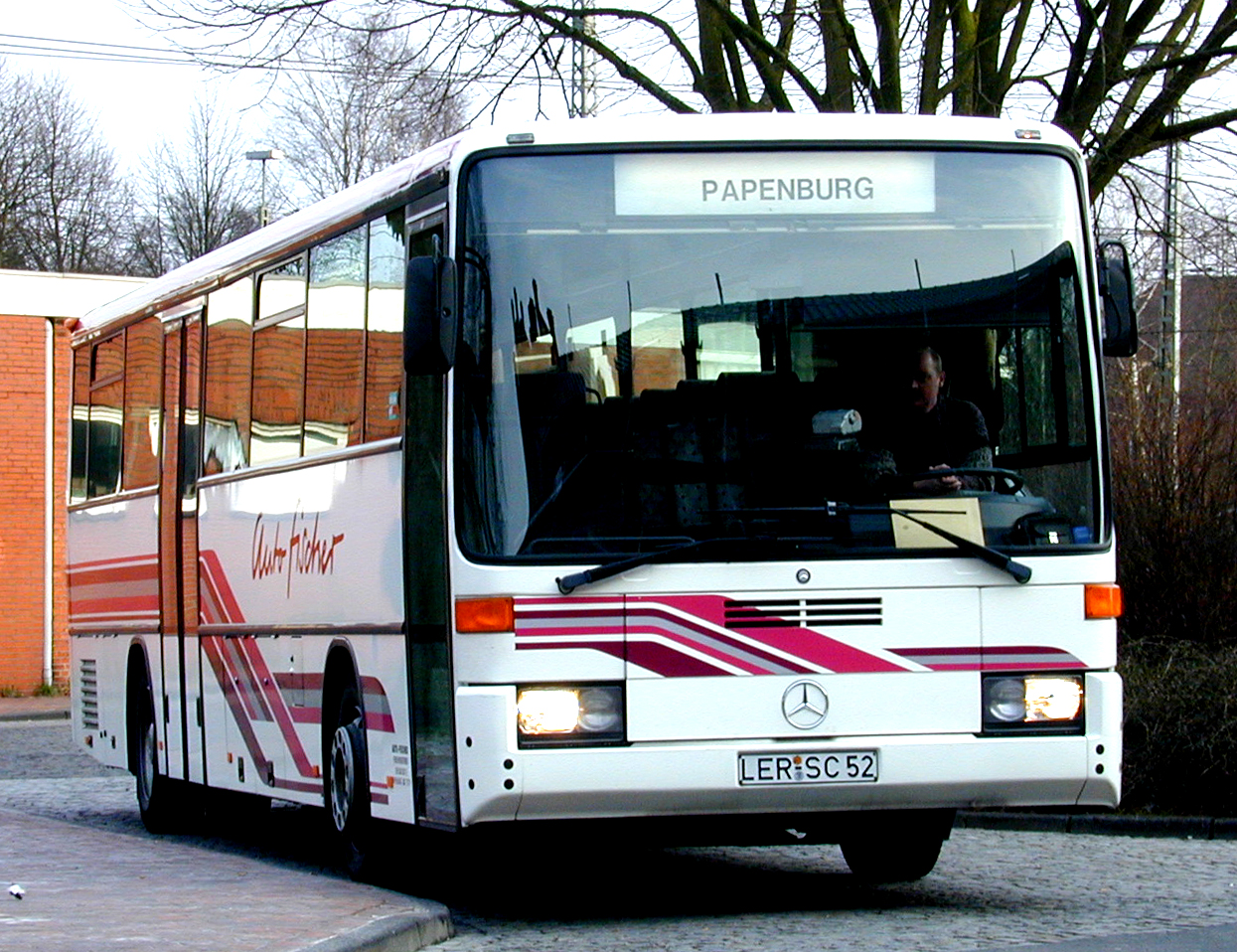 Auto Fischer bus van het Mercedes-Benz type O 408 op 27 februari 2001 te Leer (Ostfriesland)